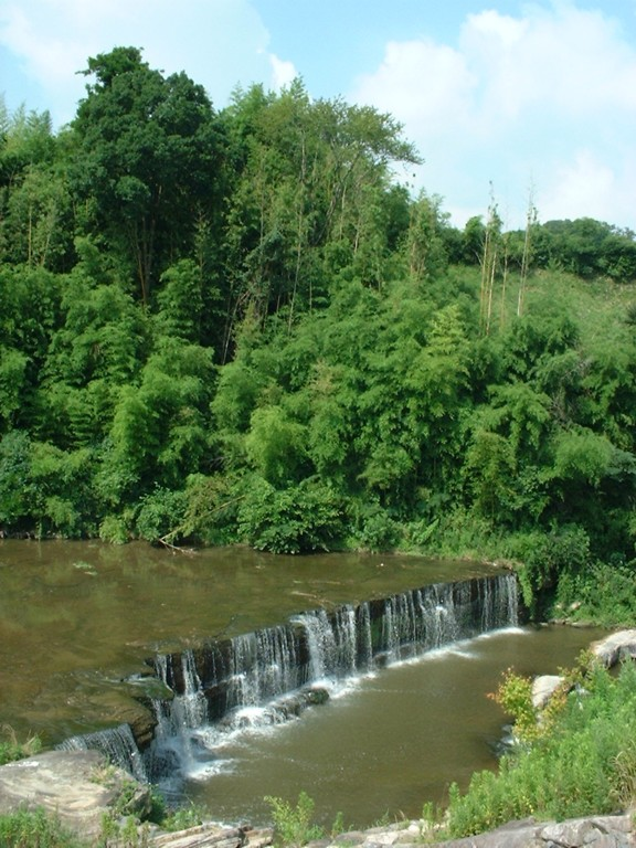 美嚢川の黒滝（美嚢郡吉川町金会）落差4m・幅30m